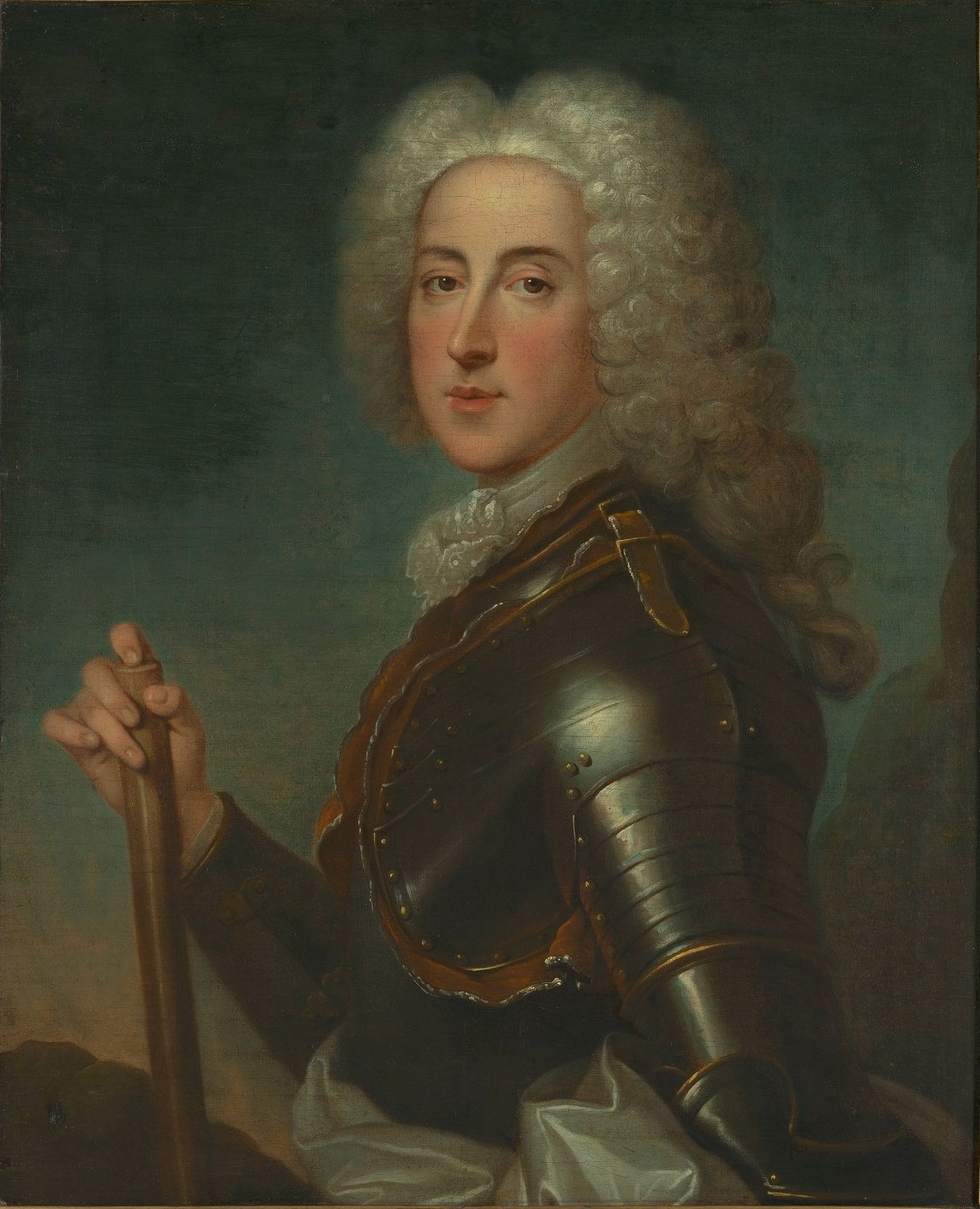 Graaf d'Ursel door Vivien